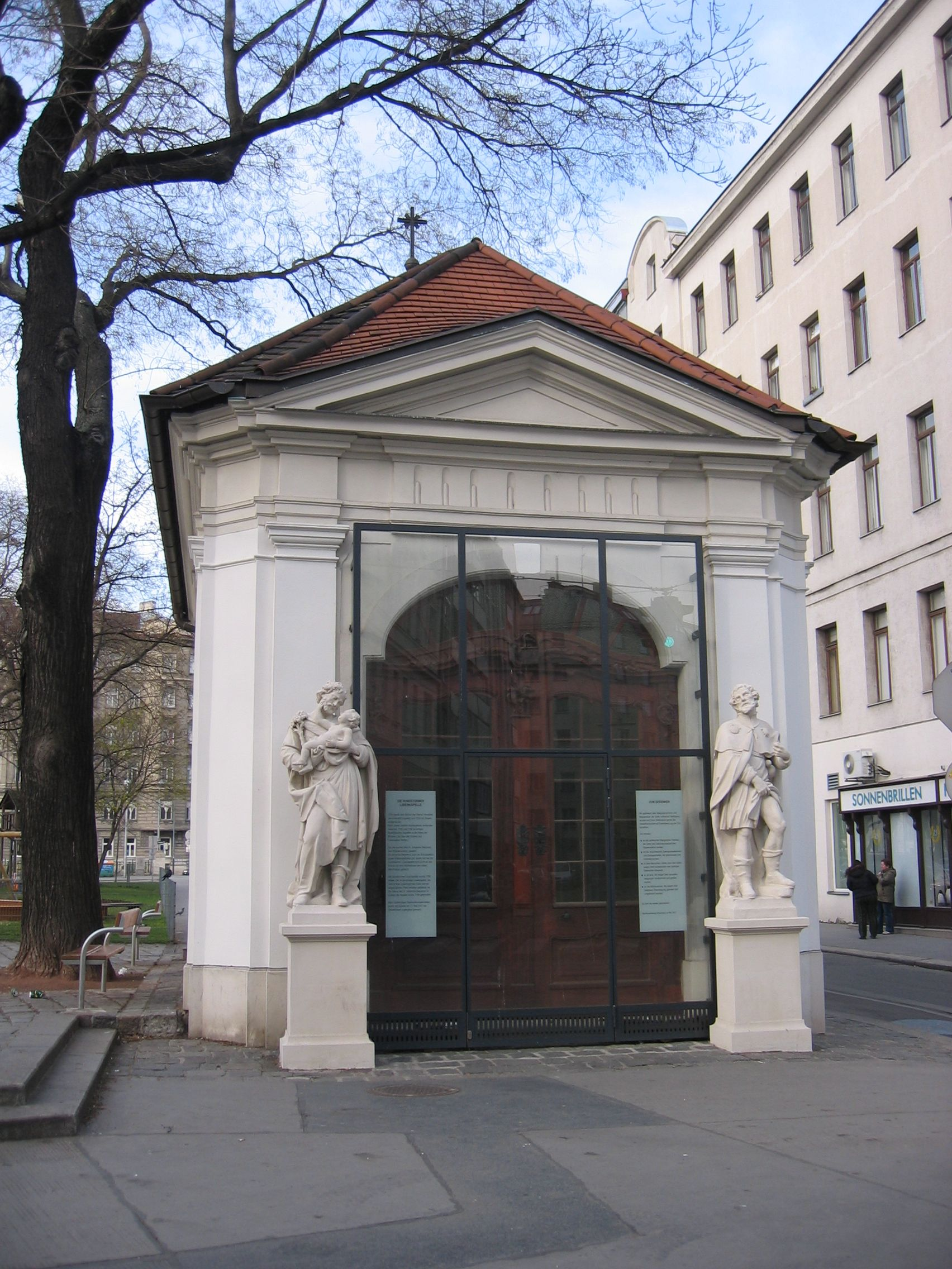 Hundsturmer Kapelle von vorne